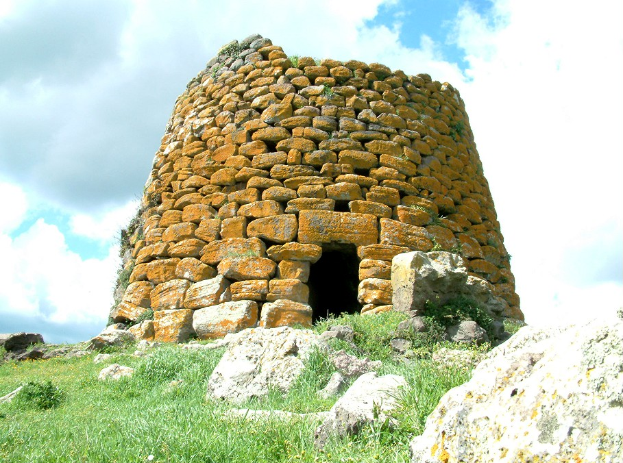 Nurage in Sardinien Nuraghe Succuronis, Macomer